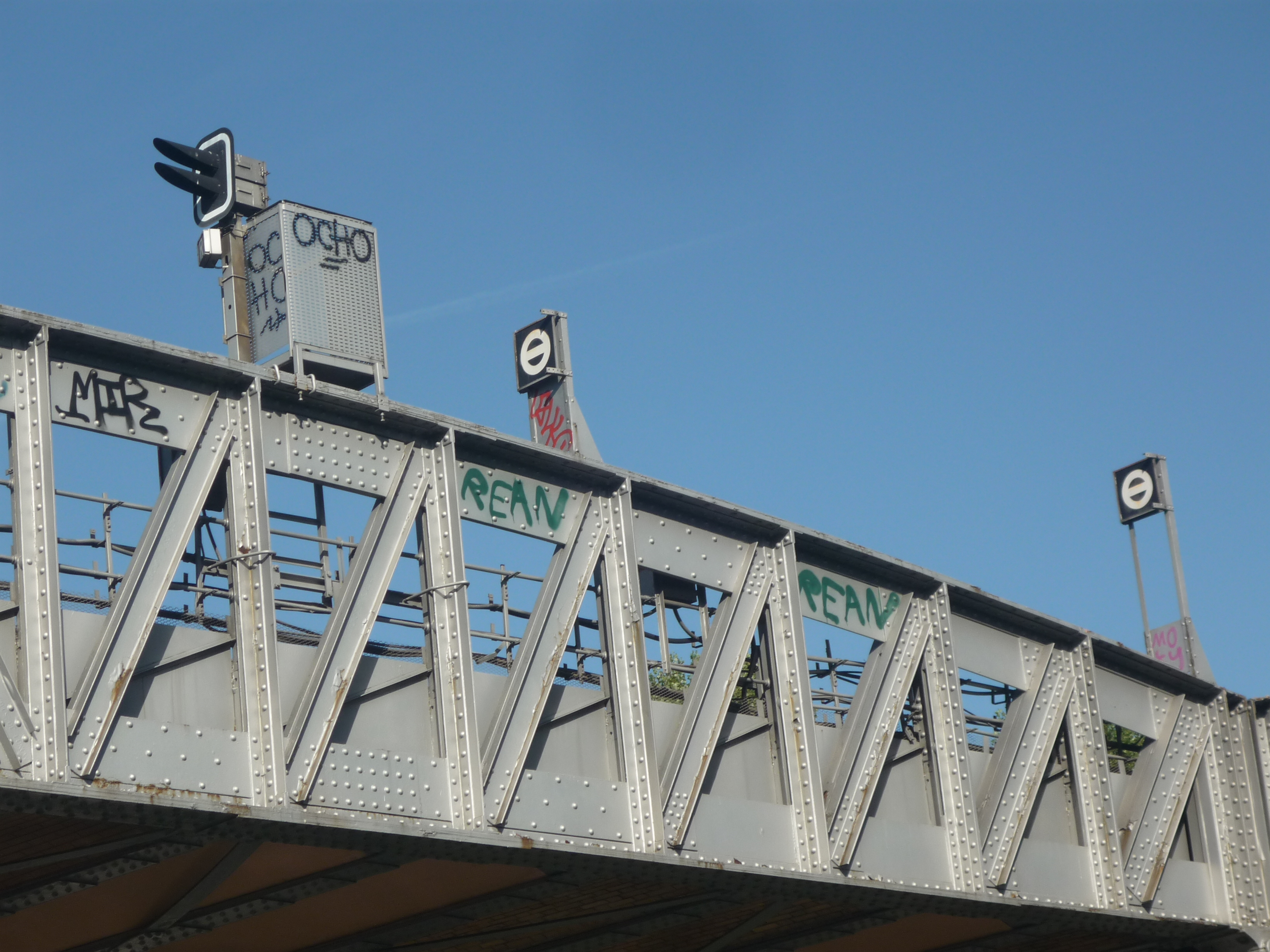 Signaux du métro parisien nommés mirlitons, positionnés entre les stations Stalingrad et Jaurès sur la ligne 2.